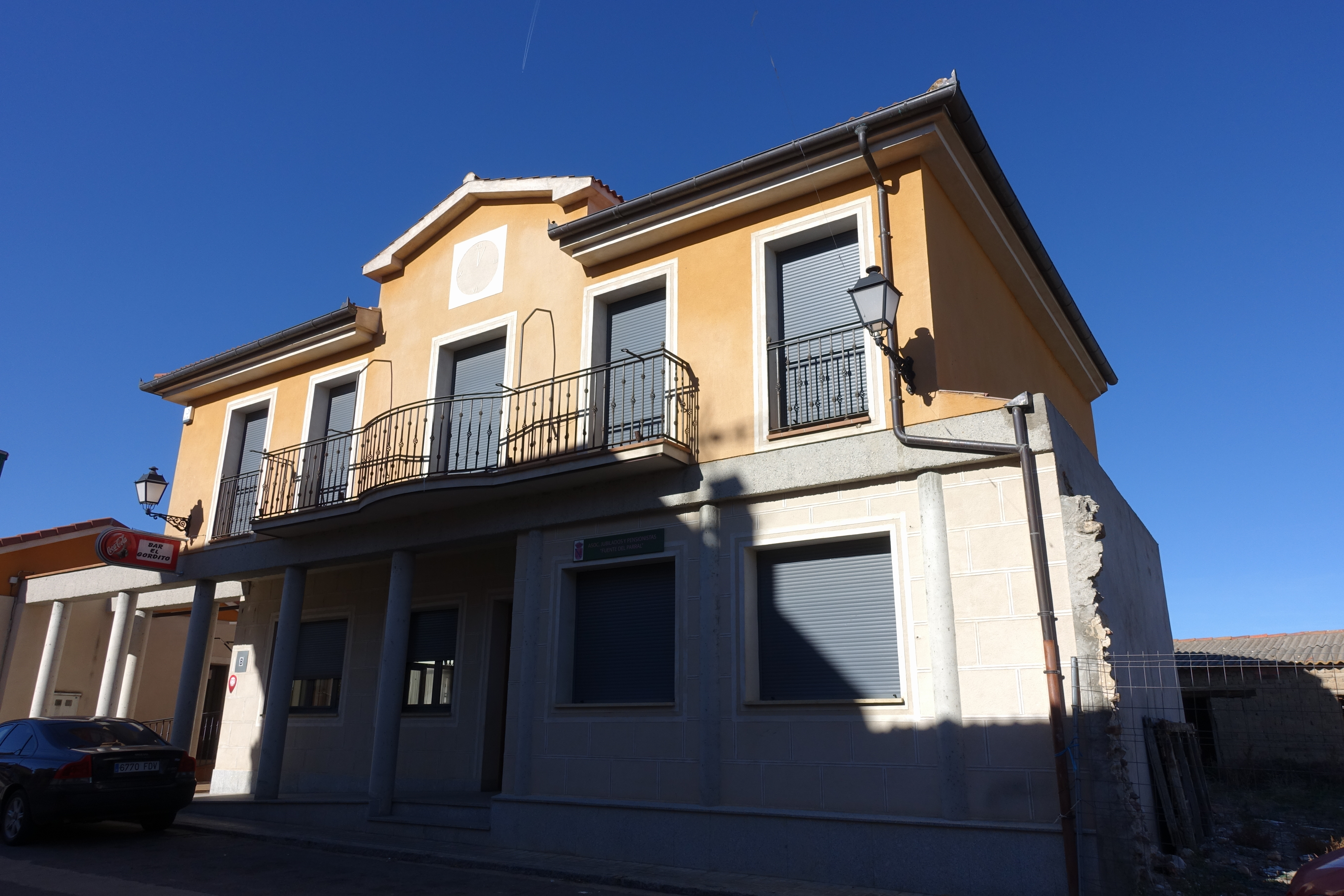 Casa consistorial de Marazoleja (Segovia, España).